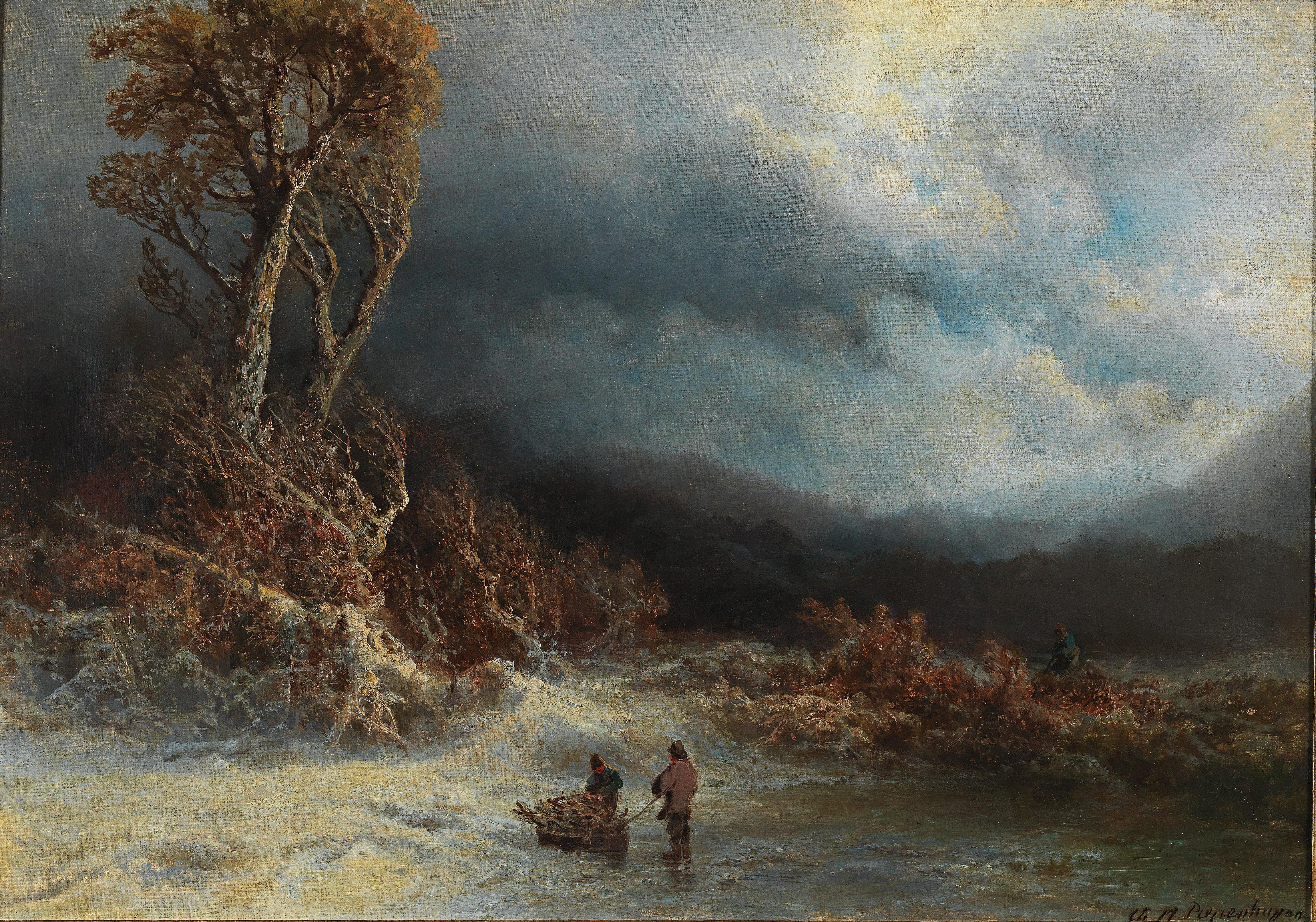 Winterlandschaft mit Holzsammlern, signiert Ch. M. Piepenhagen, Öl auf Leinwand, 48,5 x 70 cm